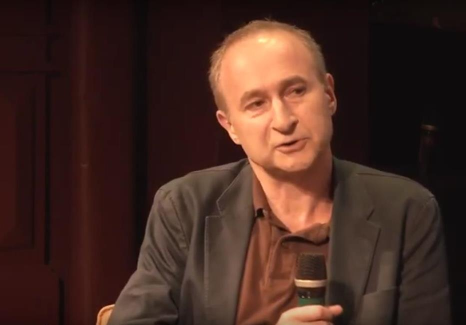 Kort na de Wereld Suïcide Preventie Dag (10 september) praat Coen Verbraak na de voorpremière van de film Voorland is Back met regisseur Susanne Heering over haar zus Annemartien, die op haar 32ste voor een trein sprong. Met psychiater Jim van Os, auteur Marian Donner, theoloog Christa Anbeek en Susanne Heering gaat hij in op de vraag hoe onze maatschappij anders ingericht moet worden om deze stijgende trend tegen te gaan.